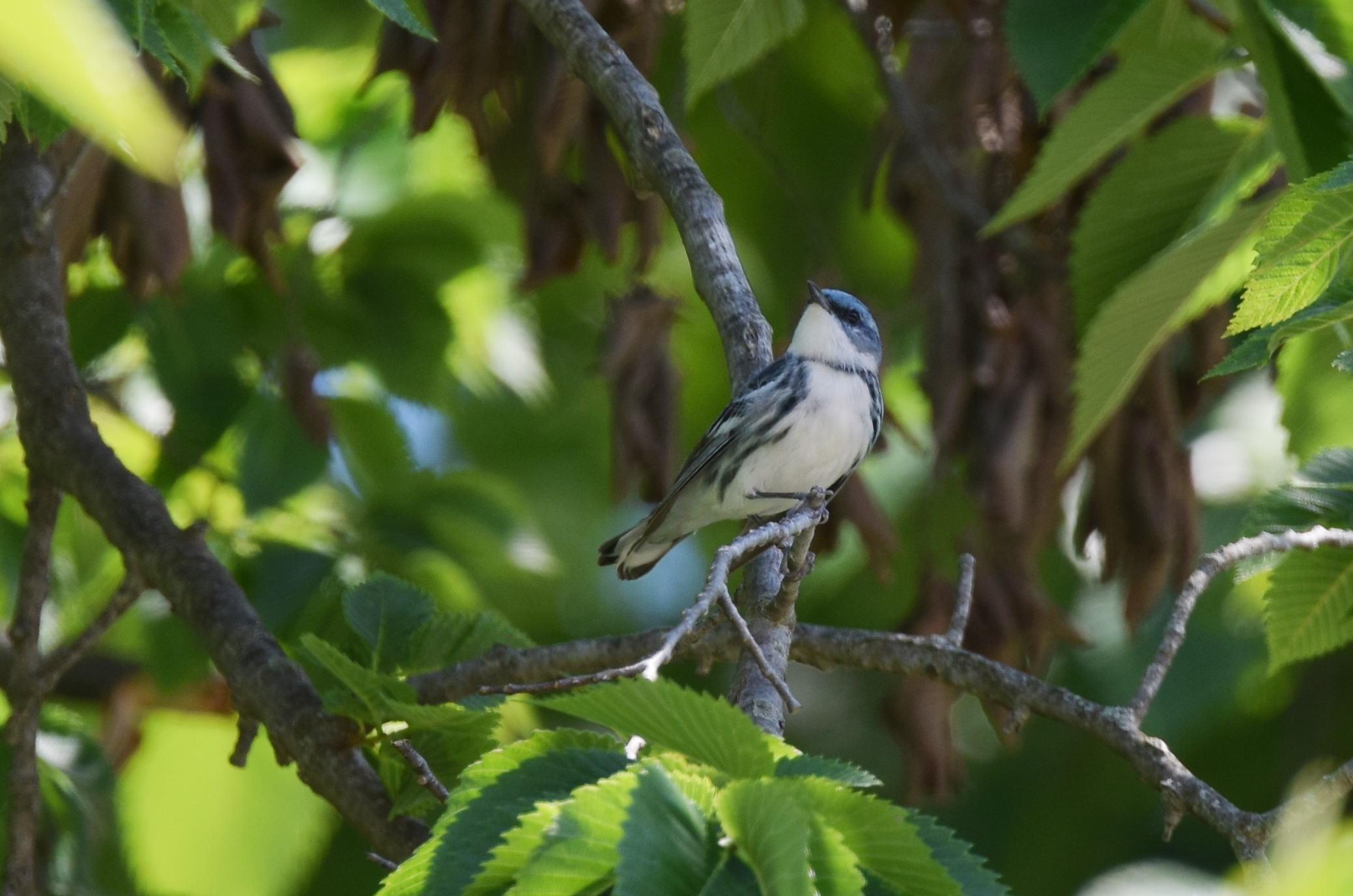 Cerulean Warbler (male)